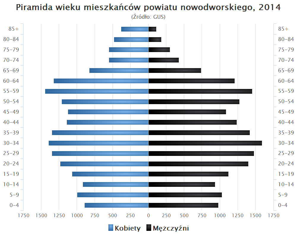 Piramida wieku mieszkańców powiatu nowodworskiego, 2014